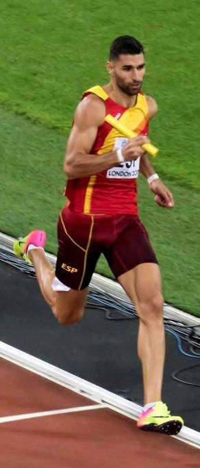 d9_21 finale 4x400m team belgium